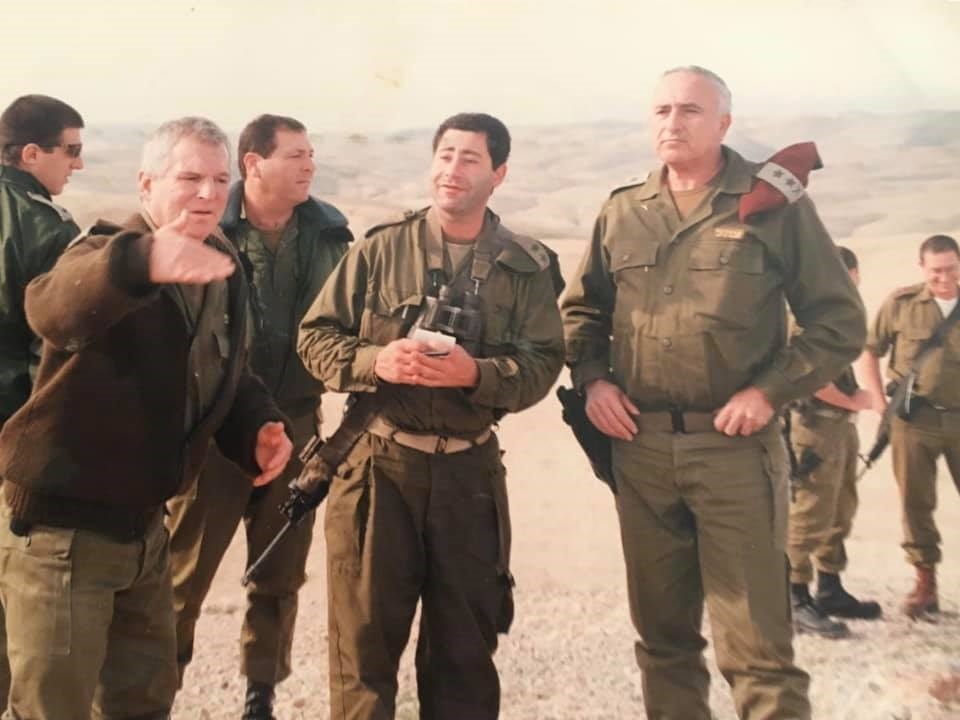 רא"ל אמנון ליפקין שחק, הרמטכ"ל, מבקר את סא"ל יובל בזק, בסיס אימון חטיבתי גולני. משמאל אלוף עמירם לוין מפקד פיקוד הצפון, מאחור - עודד בן עמי דובר צה"ל